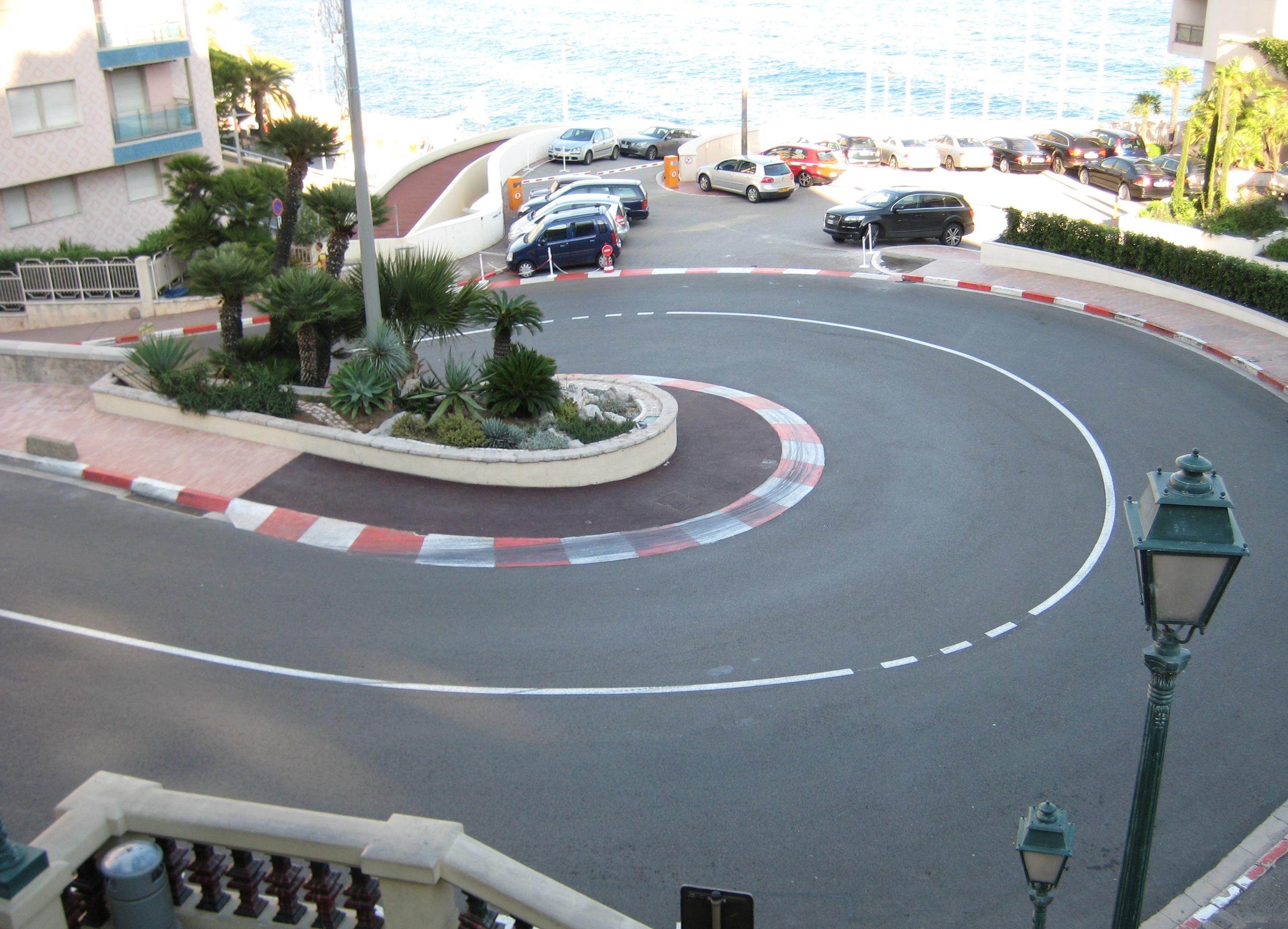 Virage en épingle sur le circuit de F1 de Monaco